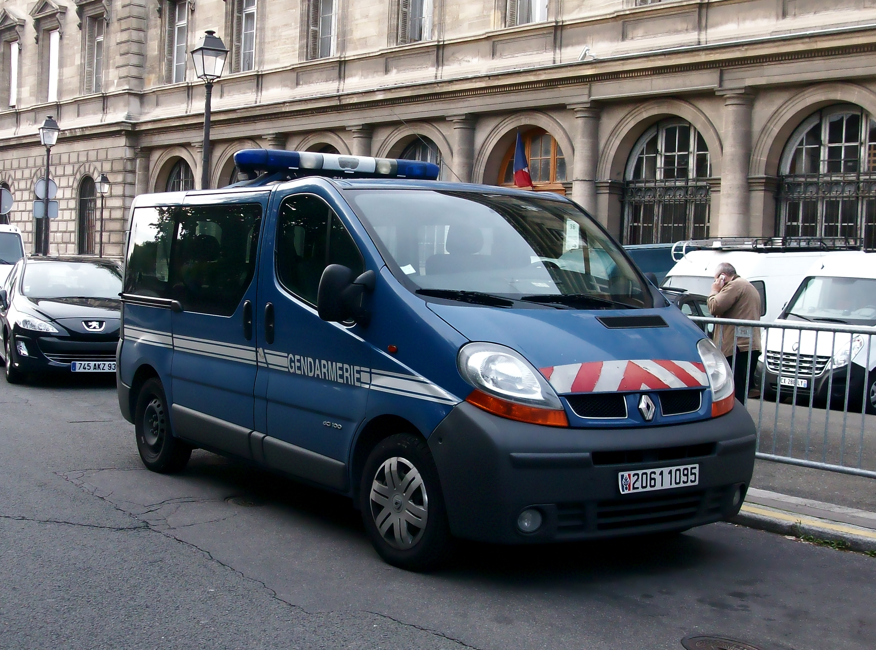 Renault Trafic de la gendarmerie nationale à Paris